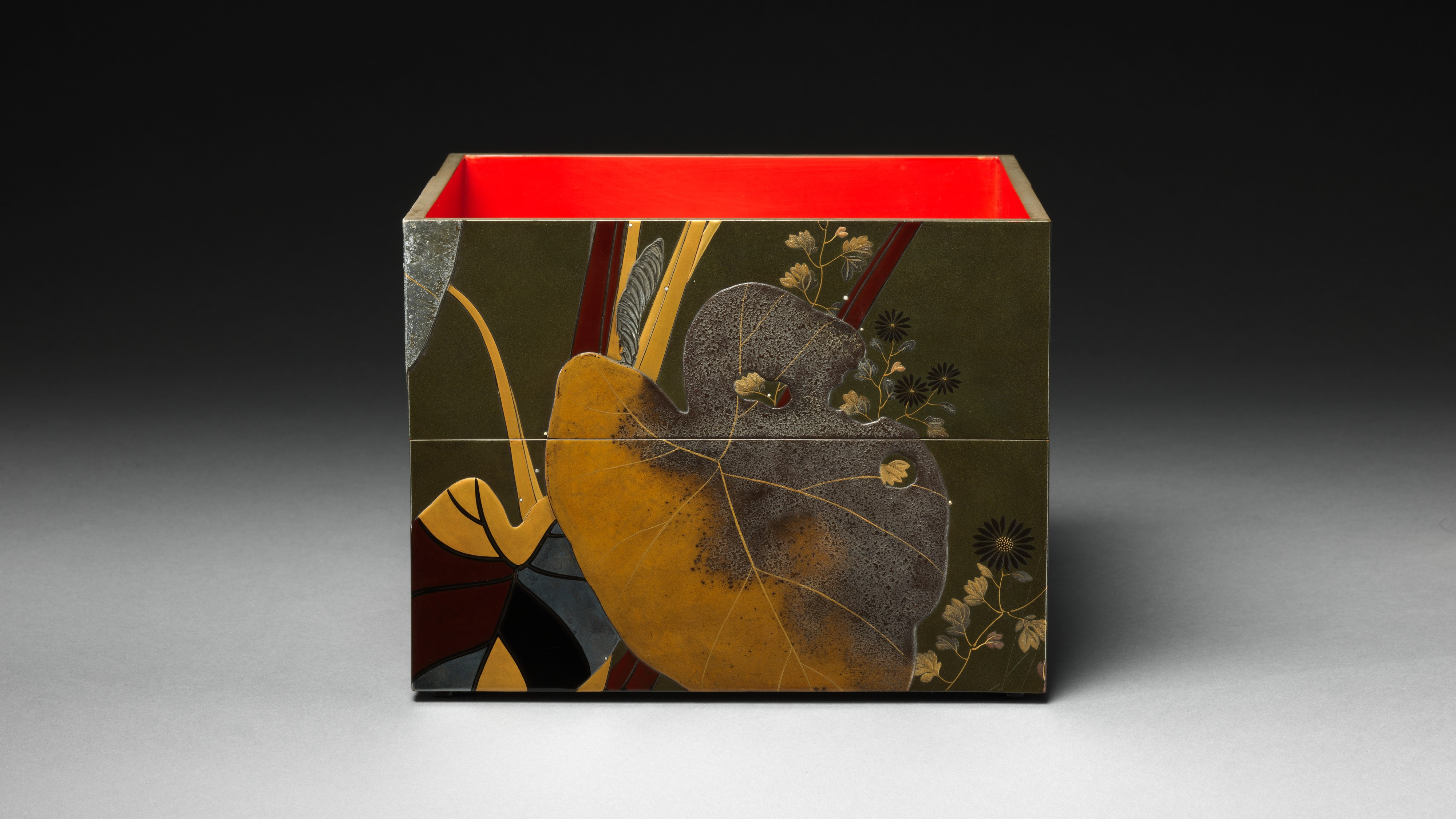 Japan; Box; Lacquer